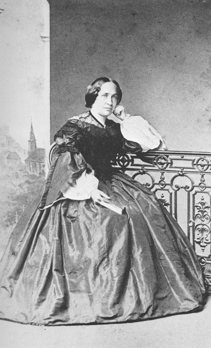 Mathilde Weber, Porträtfoto von Georg Friedrich Brandseph (Albuminabzug)